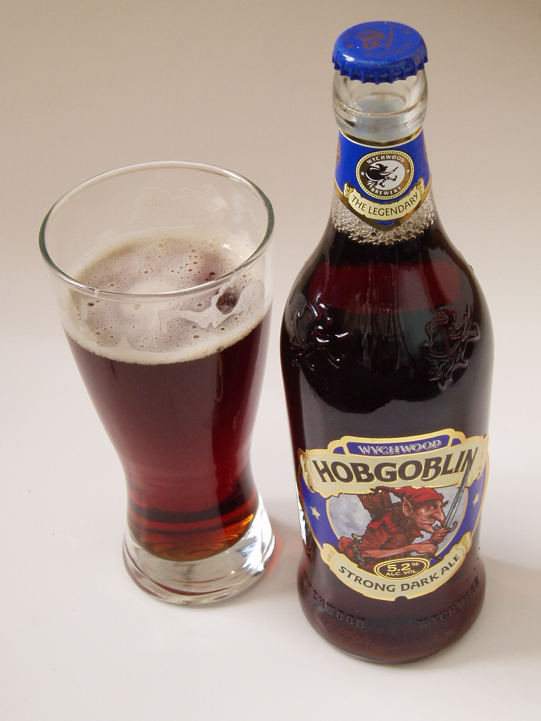 Hobgoblin, from Wychwood Brewery